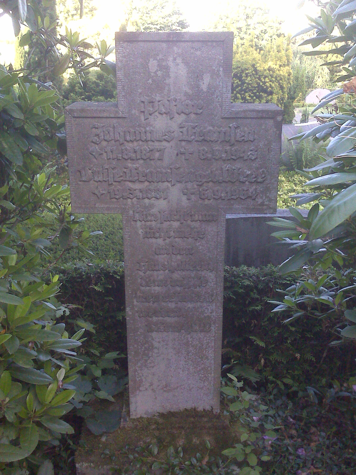 Grabstein Johannes Tramsen